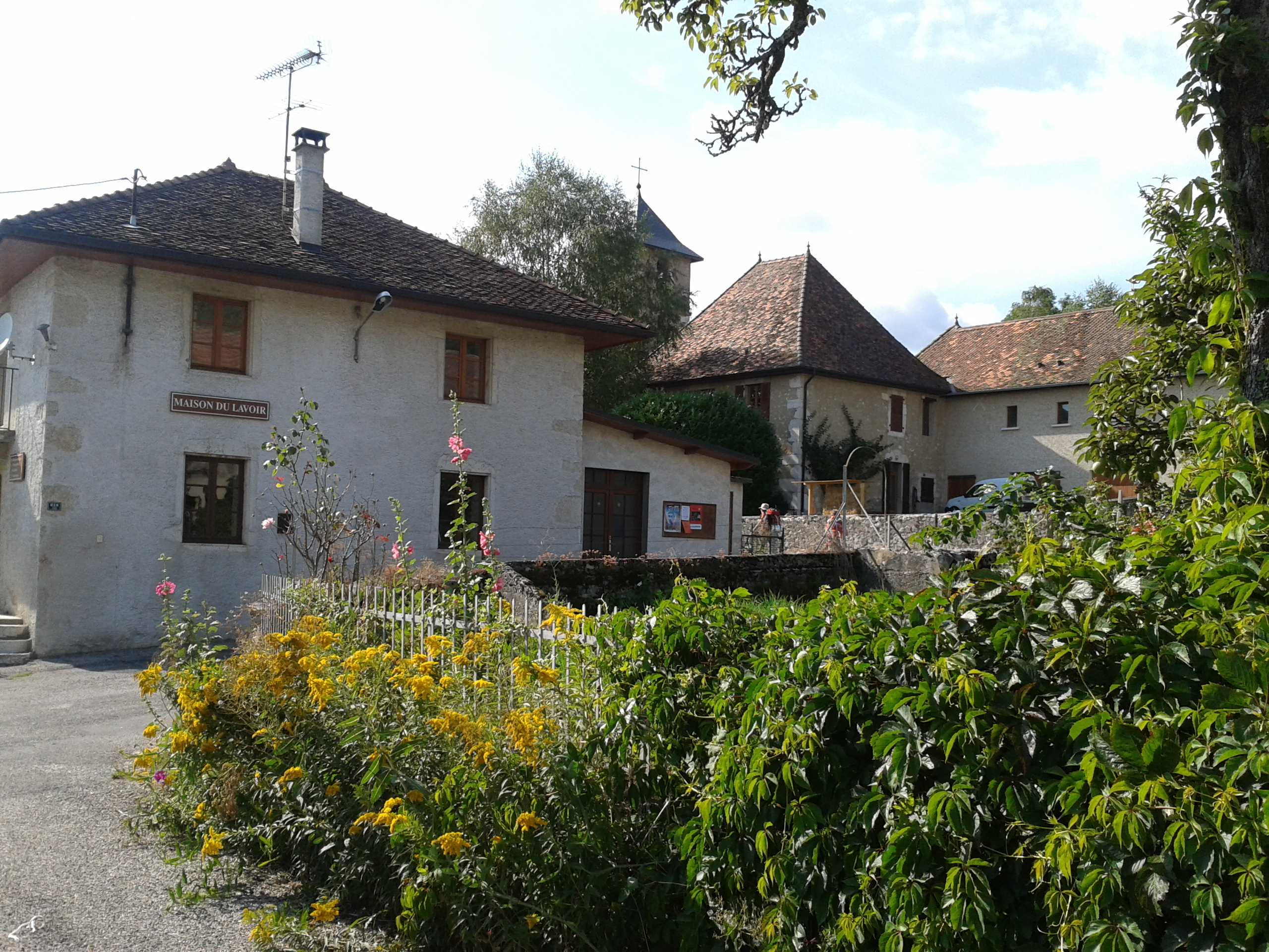 Saint-Maurice-de-Rotherens : Maison du Lavoir